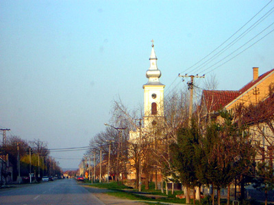 Улица Марка Стојановића у Врачев Гају